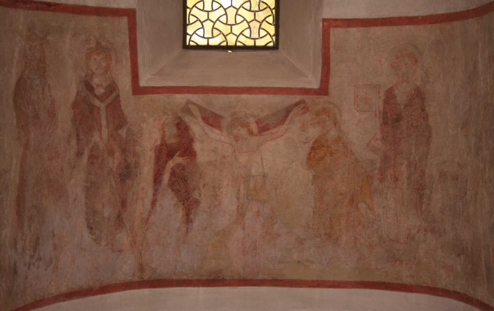 Fresko Kreuzigung Jesu mit Heiligenregister, Ev. Kirche Almersbach